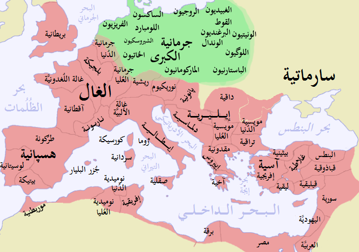 الإمبراطوريَّة الرومانيَّة سنة 116م و جرمانية الكُبرى، مع بعض أسماء القبائل الجرمانيَّة التي كانت معروفة آنذاك، وفق ما ورد في الوثائق الرومانيَّة القديمة.